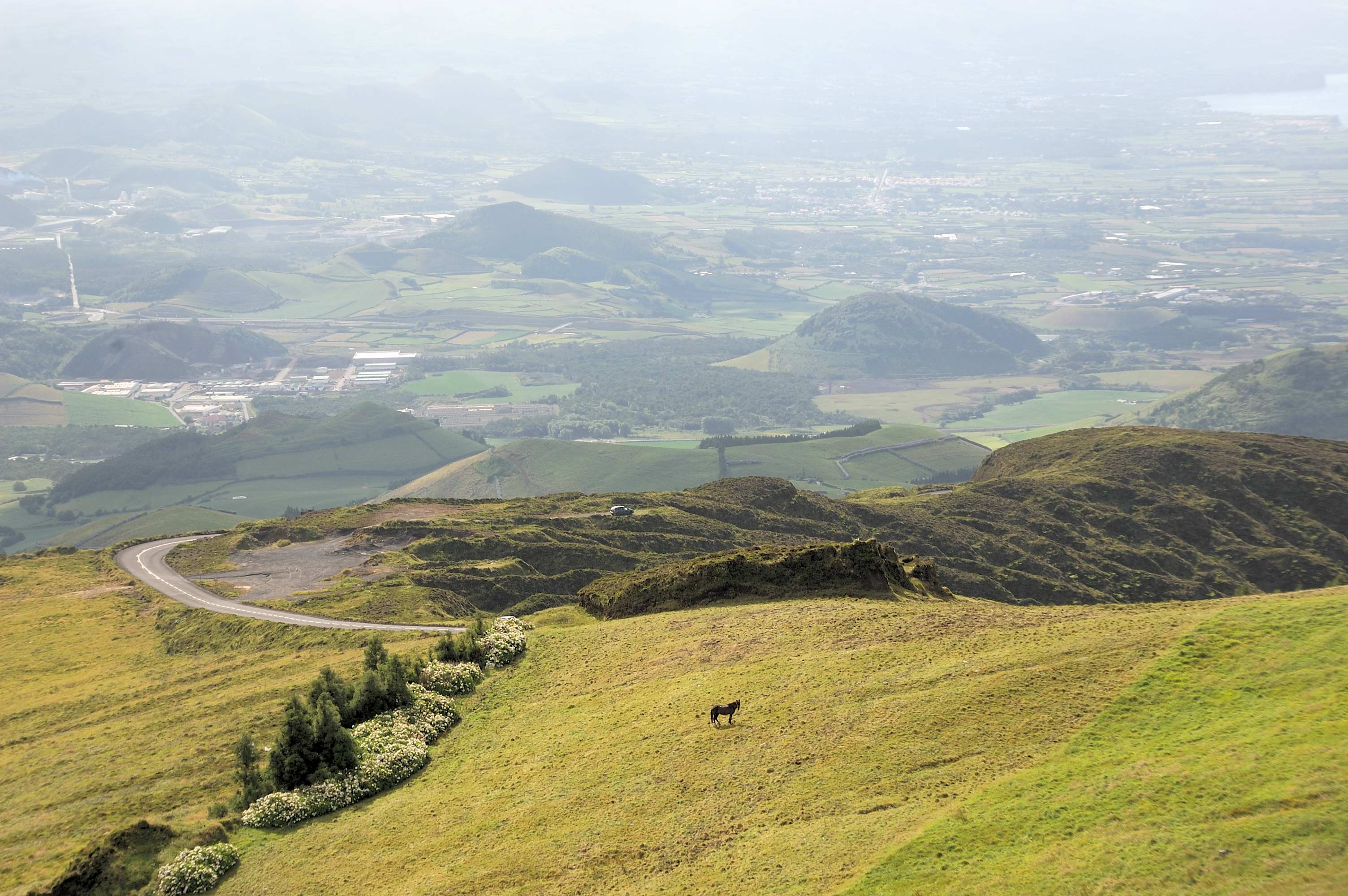 Azores, Portugal.